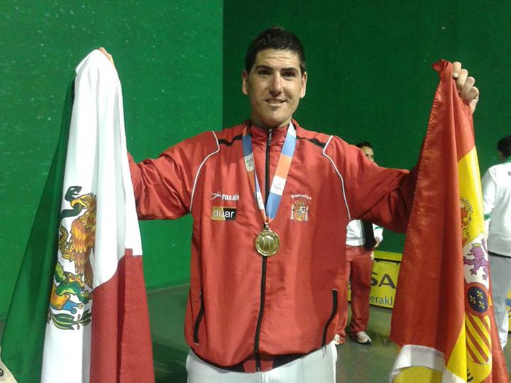 medalla